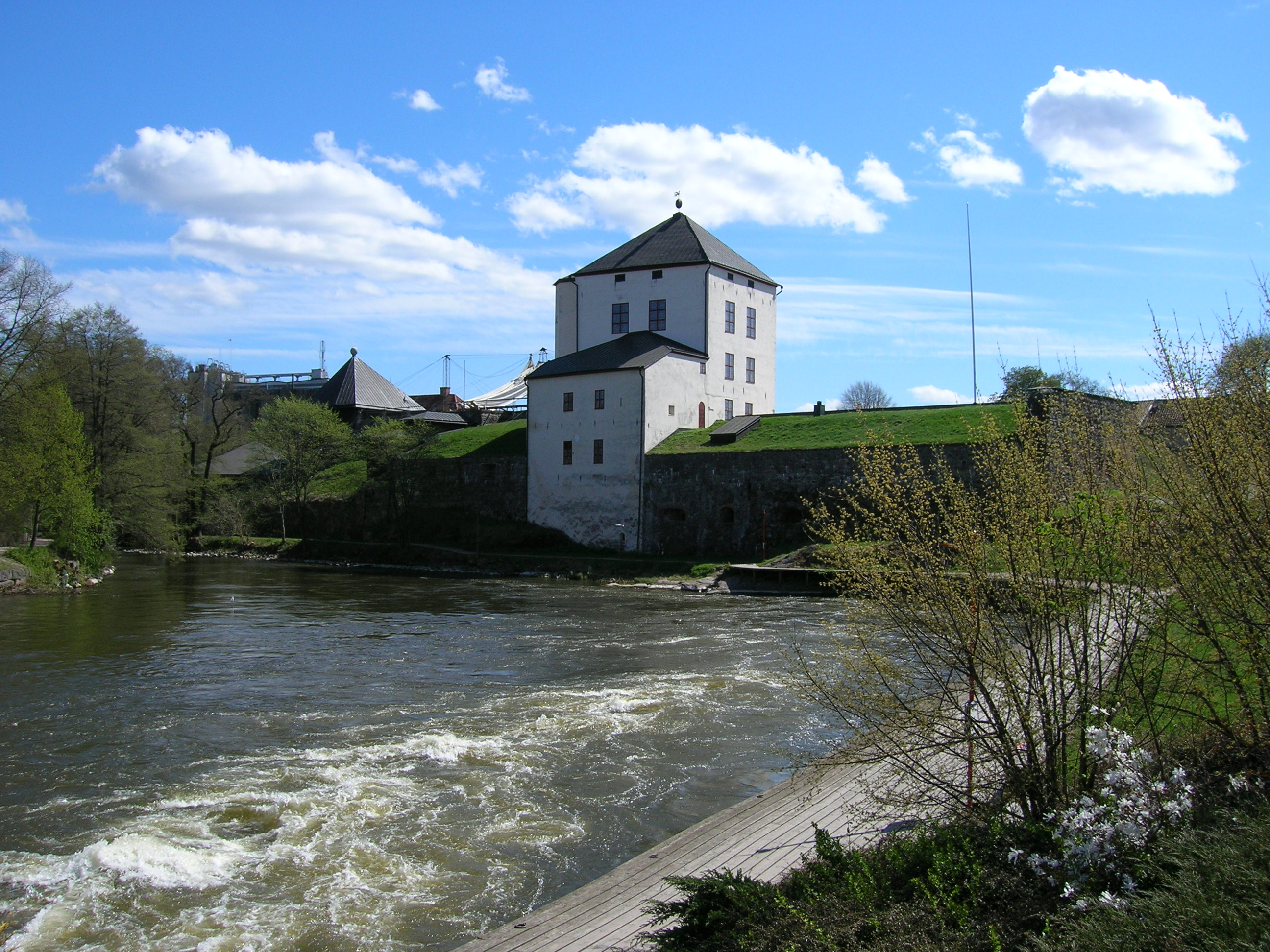 Nyköpingshus 13 maj 2006. Fotograf: Niklas Nordblad